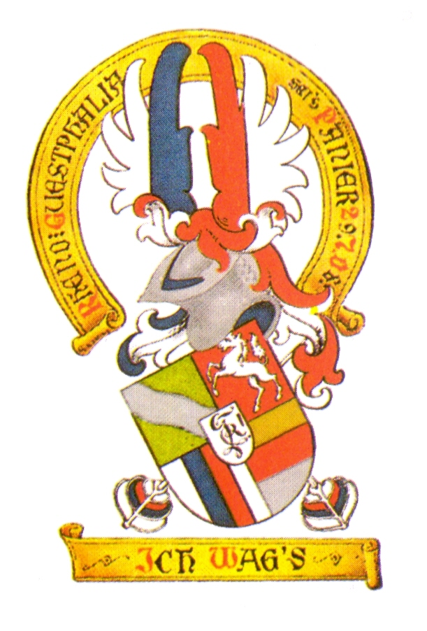 Wappen des am 29.7.1908 gestifteten Corps Rheno-Guestphalia Münster im Stil der Neugotik